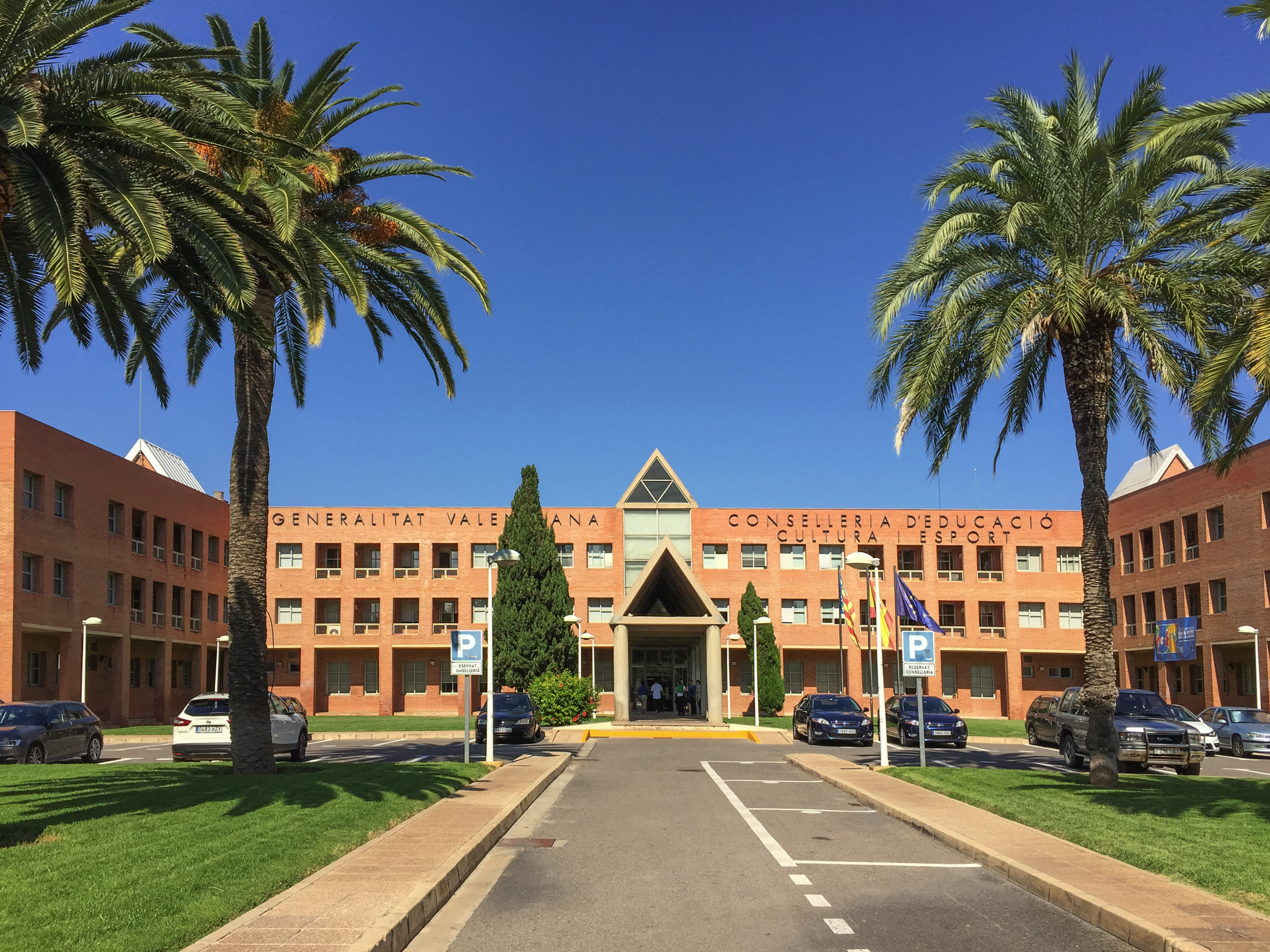 conselleria de cultura Generalitat valenciana 2015